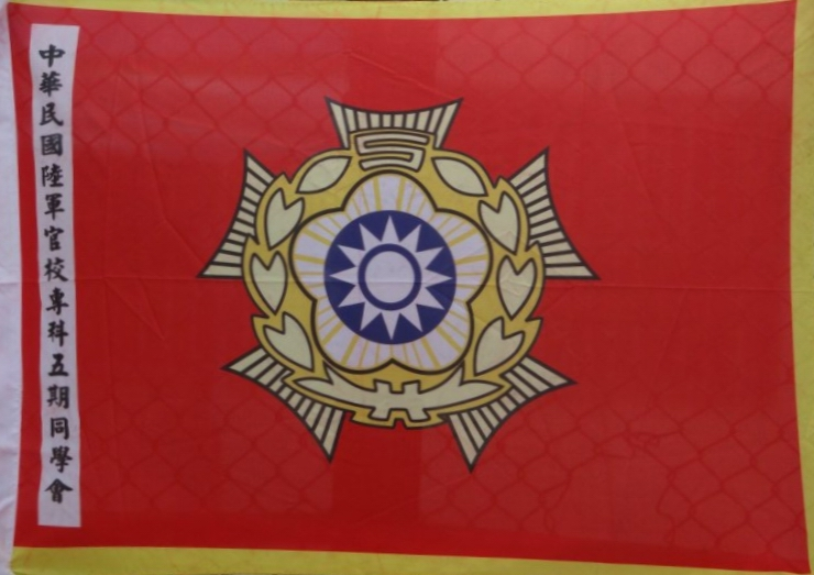 本人拍攝之陸官專五期同學會會旗